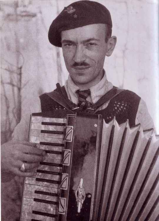 Wacław Żdżarski (ur. 1913 – zm. 1983) – dziennikarz, historyk, krytyk filmowy, syn Wacława i Hanny Kanteckiej